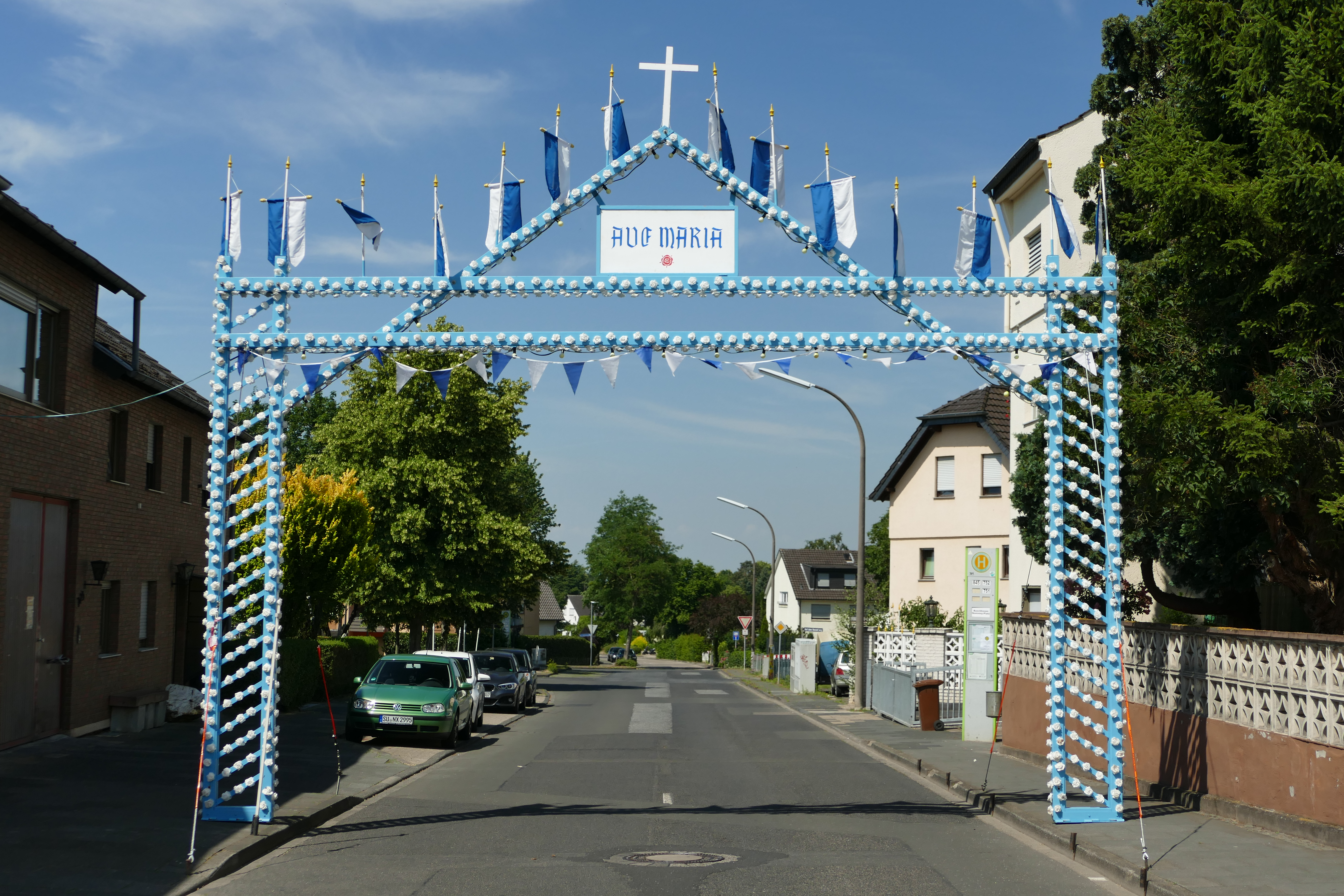 Rosenbogen auf der Alten Poststraße (West) in Buschhoven, anlässlich des jährlich stattfindenden Rosenfestes. Von Osten aus gesehen.